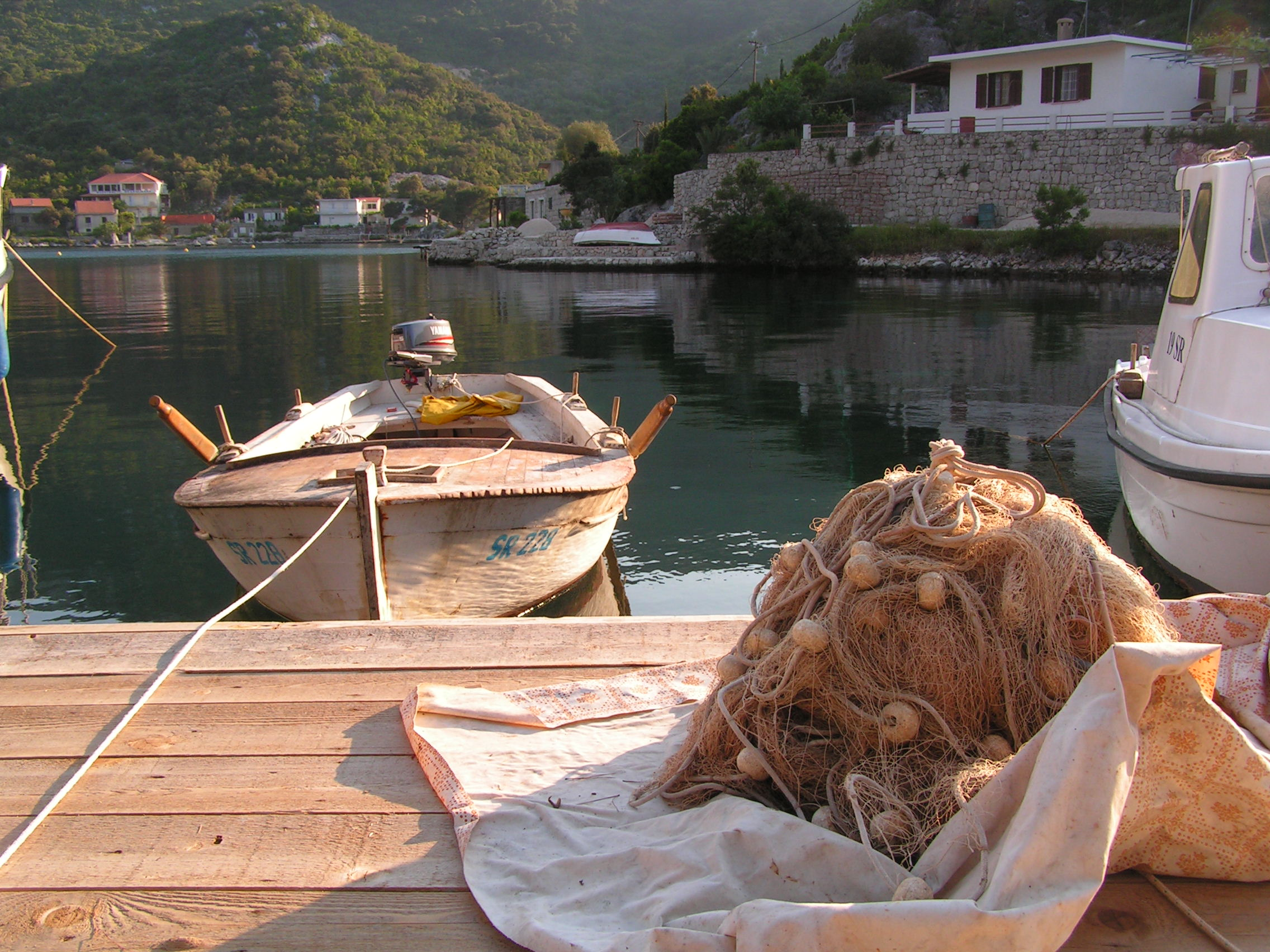 Deze foto is in 2006 genomen door de initiële auteur van deze bijdrage, toen hij tijdens een zeilreis Okuklje aandeed.